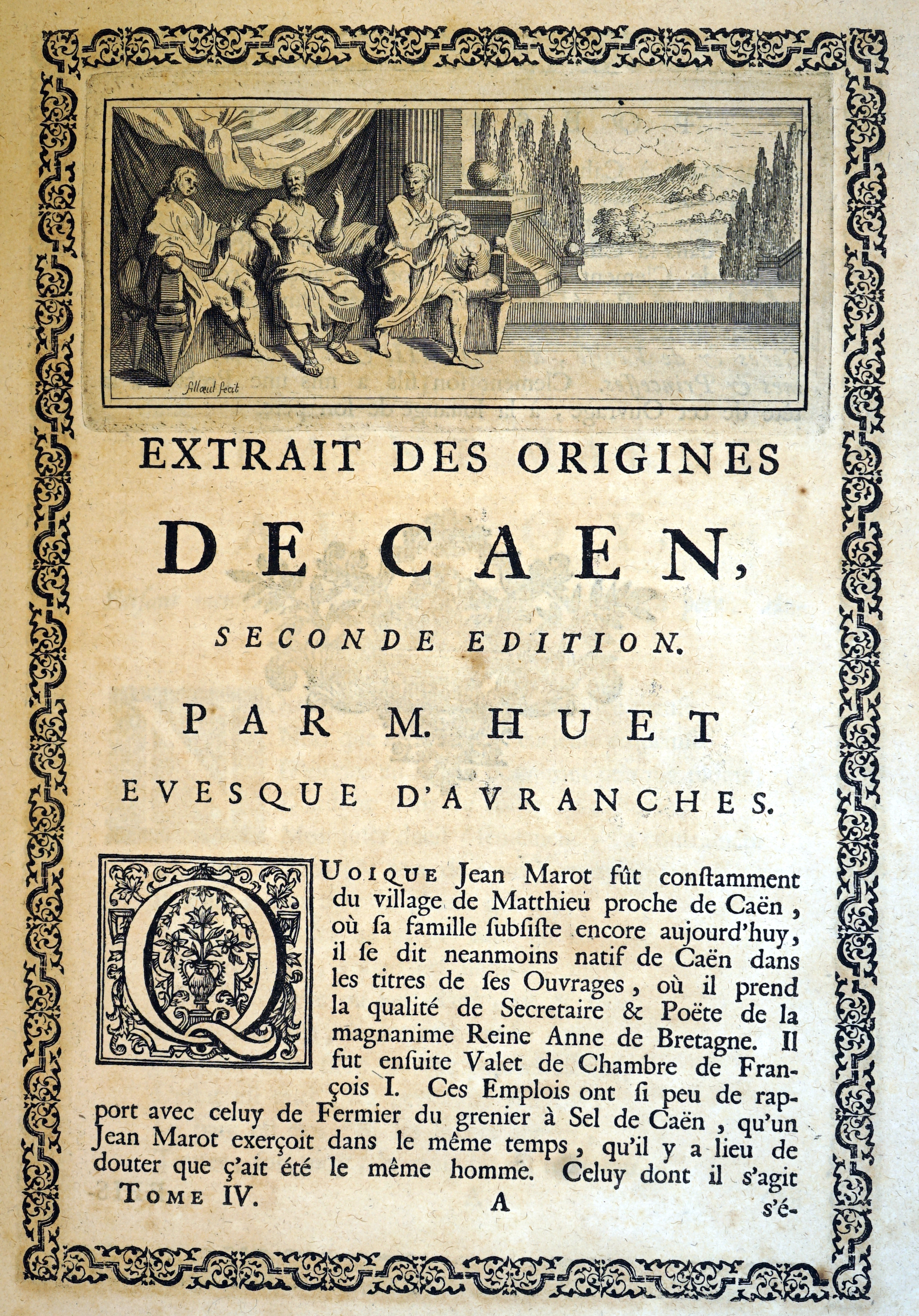 extrait de Œuvres Marot..., publié en 1731. Image gravée par Filloeul.